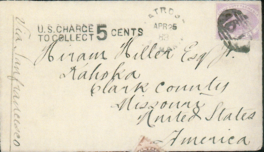 Enveloppe d'une lettre adressée à Hiram M.Hiller, postée de Tasmanie en 1883